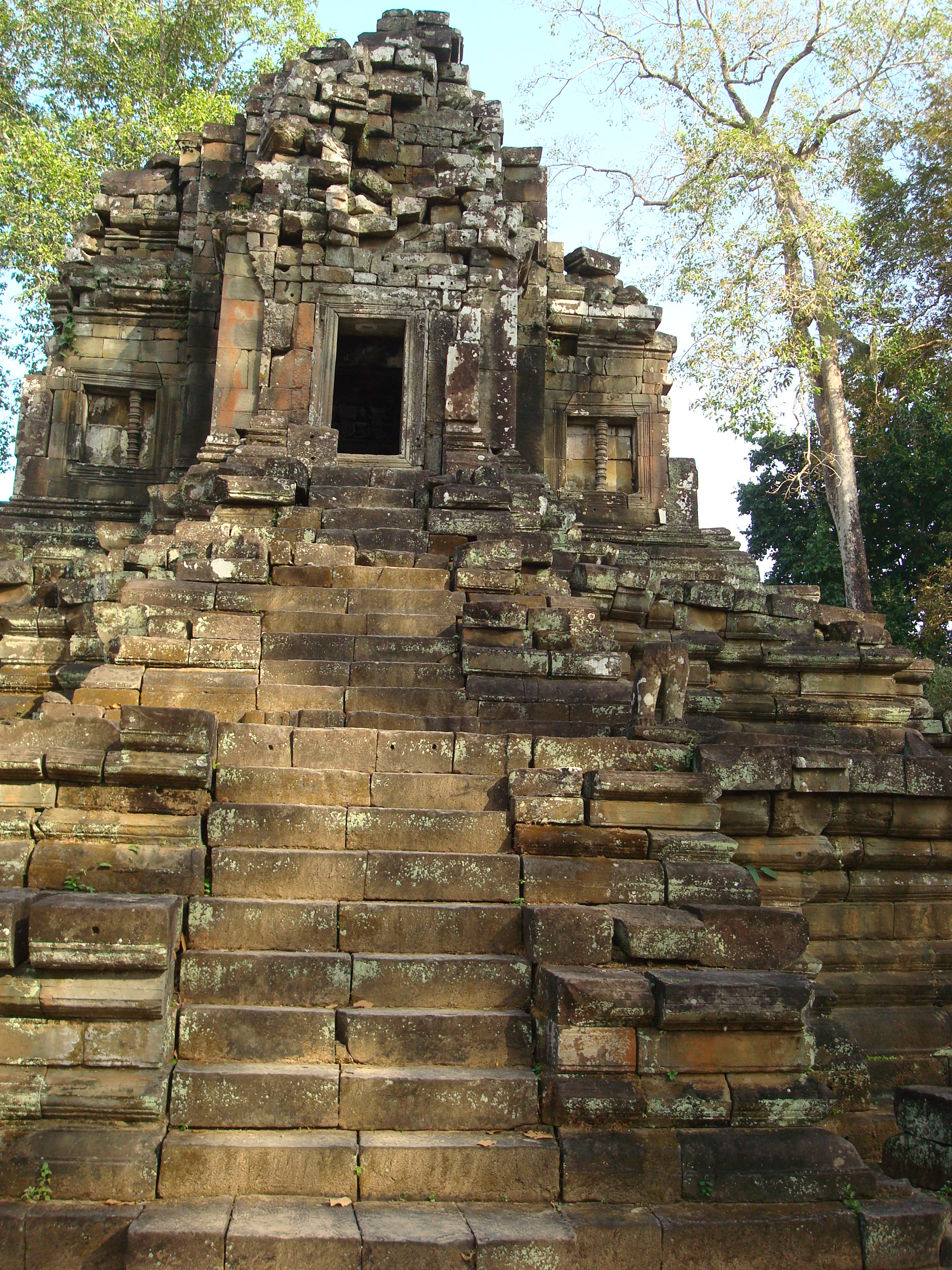 Tempel X